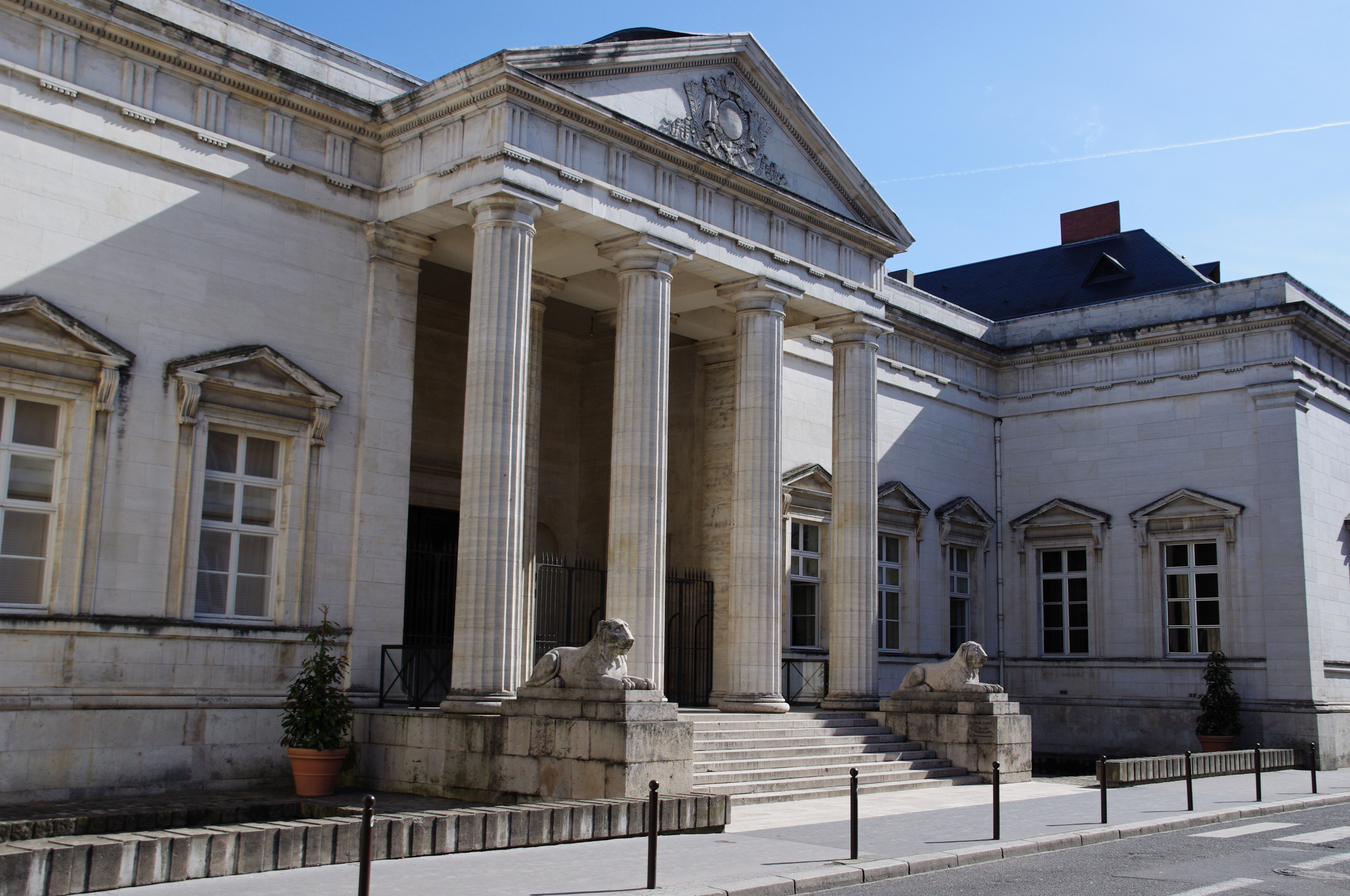 Palais de justice, rue de la Bretonnerie, Orléans, Loiret, France